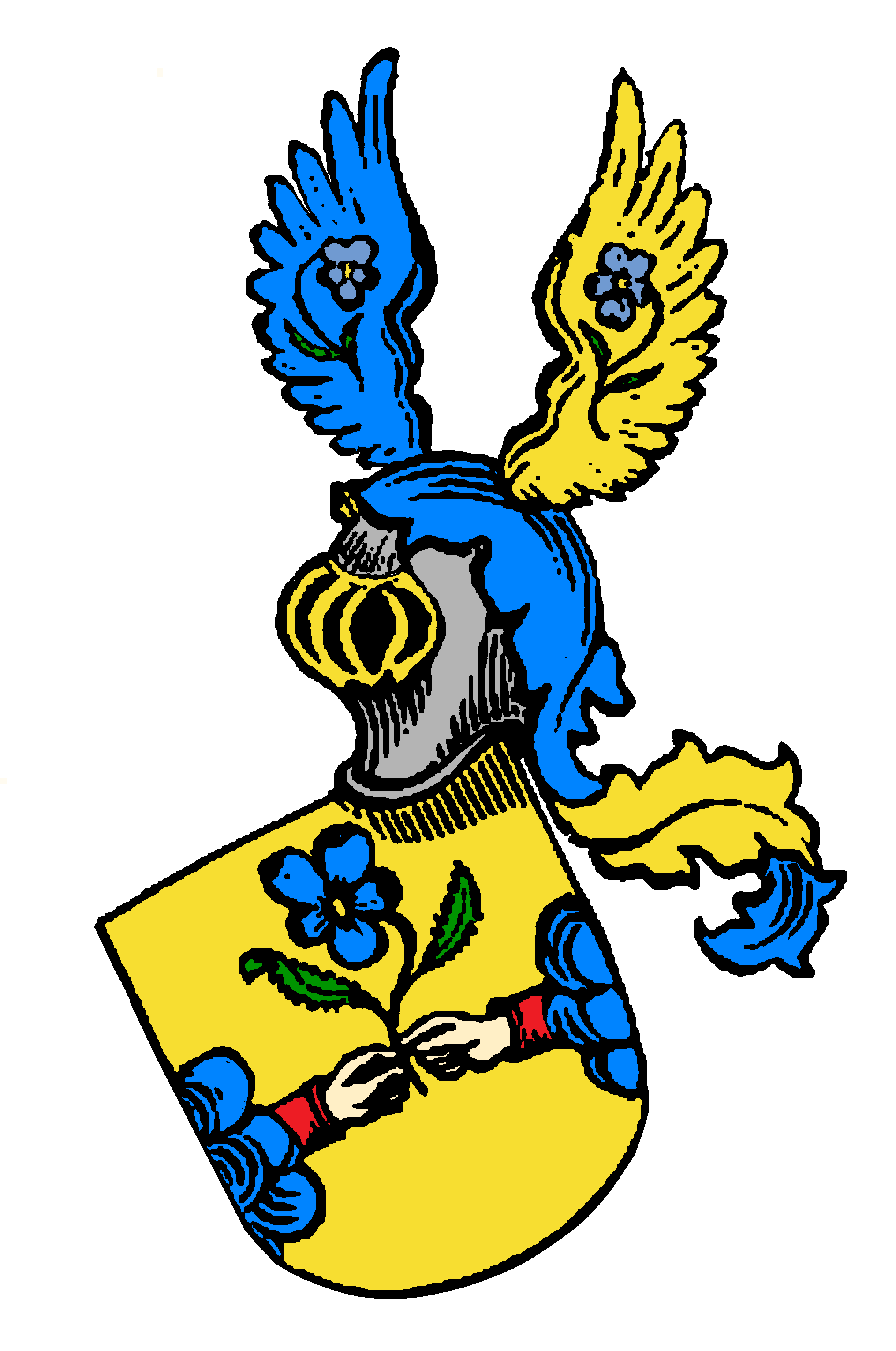 Wappen der seit dem 15. Jh. Kölner Patrizierfamilie Jabach (Reichsadelsstand 1488, kaiserlich bestätigt 1621), † 1761.